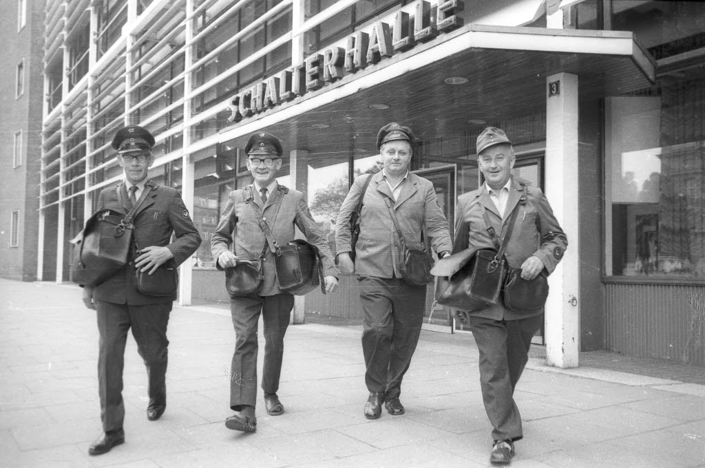 vor der Hauptpost am Stresemannplatz beim Start zu ihrer letzten Runde: Die Herren Meyer, Berndt, Carstens und Dworak (vermutlich von links) werden durch den bargeldlosen Zahlungsverkehr ersetzt.